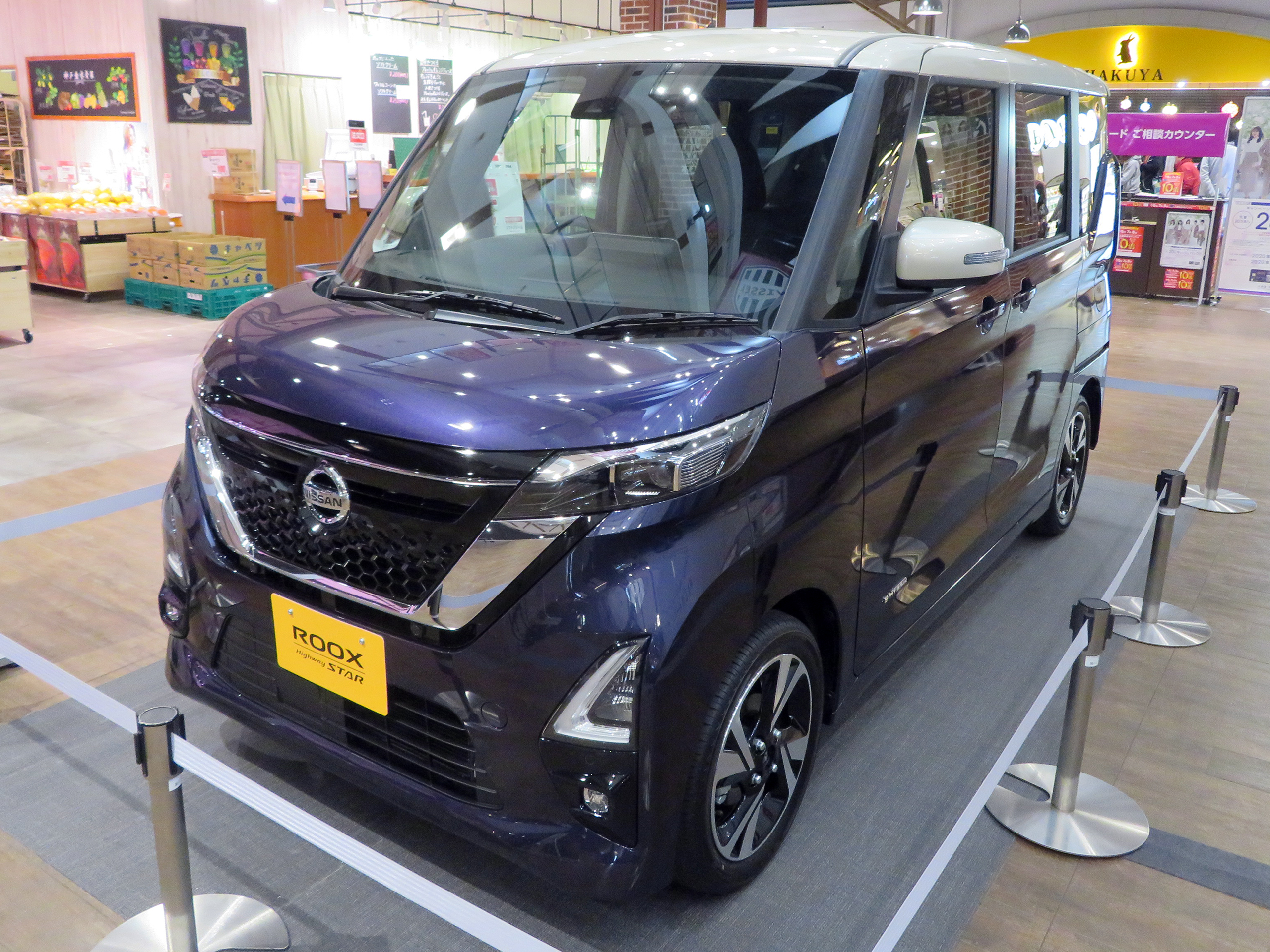 5AA-B44A型日産・ルークスハイウェイスターX 2WDをフロントから撮影。